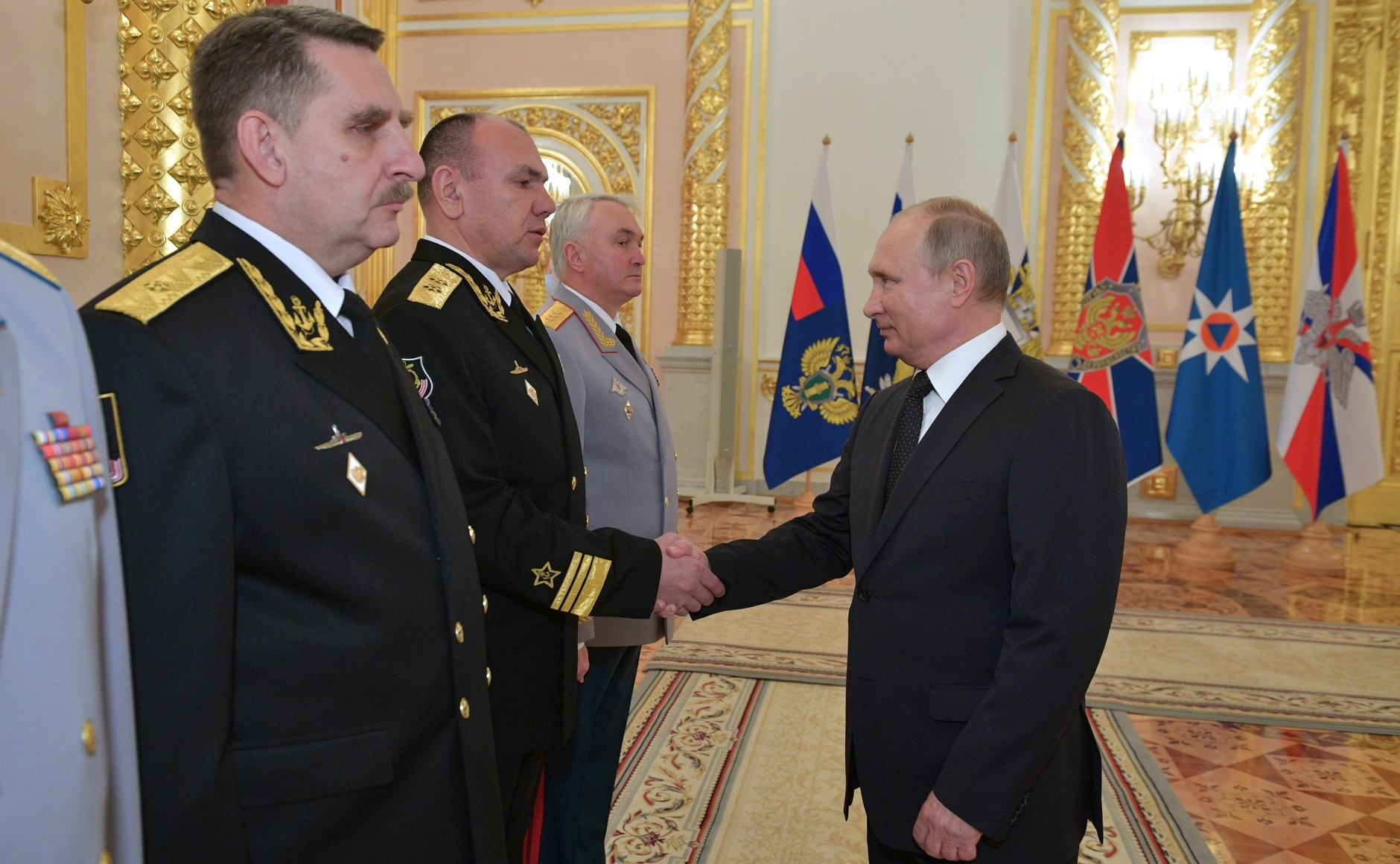 На церемонии представления офицеров и прокуроров, назначенных на вышестоящие должности